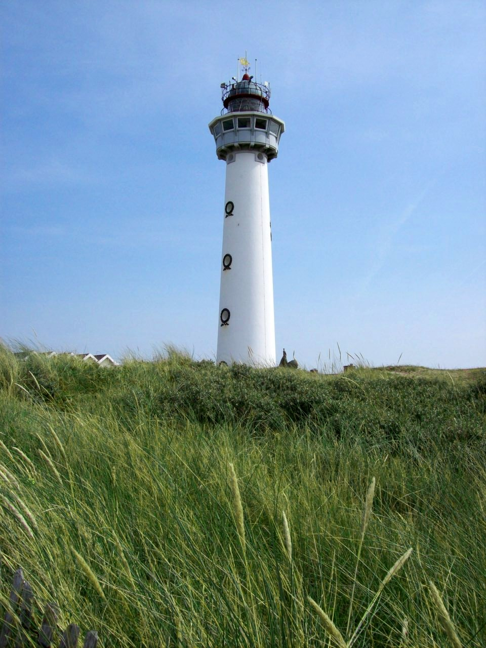 Leuchtturm in Egmond an Zee J.C.J. van Speijk (52° 37' 8.70" N, 4° 37' 15.62" O)